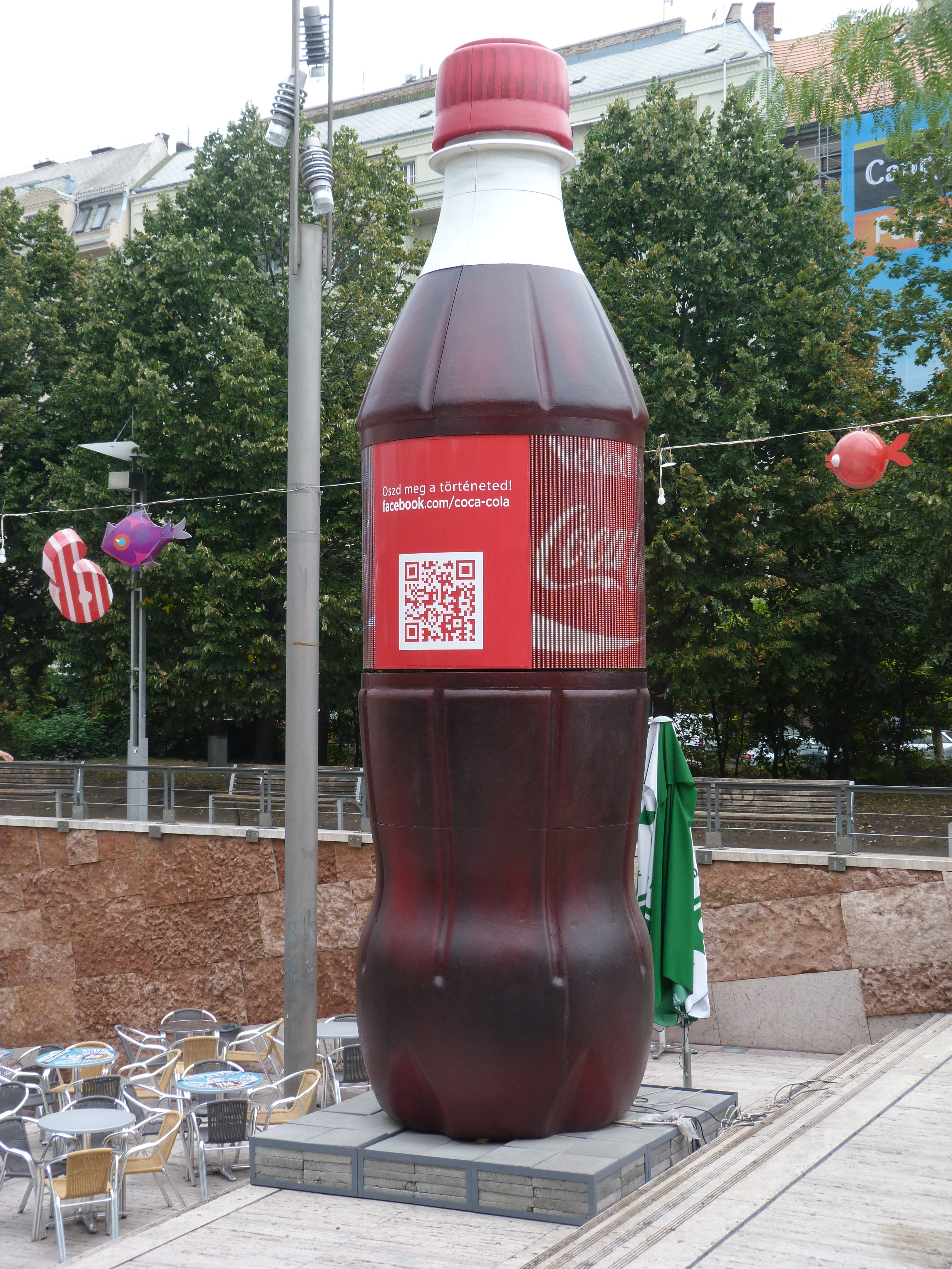 A felvétel 2013. Augustus 26 –án készült Budapesten. Belváros, Deák tér. Gödör - Akvárium ©© Derzsi Elekes Andor, Budapest, 2013, You are authorised to use these photos and vids under Creative Commons – even for commercial, for profit purposes. Photos must be attributed to Derzsi Elekes Andor. All of the photos and vids in the Metapolisz DVD line are under Creative Commons and can be used even for commercial – for profit – purposes. Recommended Citation Derzsi Elekes Andor: Metapolisz DVD line